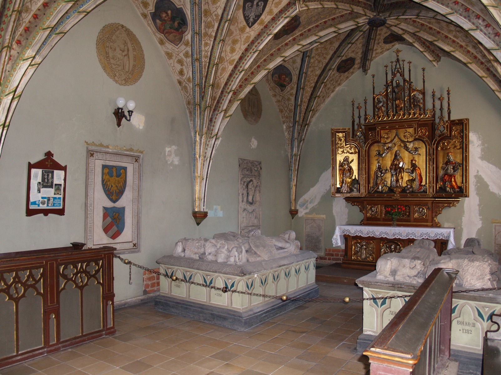 Opole, ul. Zamkowa - kościół, obecnie parafialny p.w. Św. Trójcy, kaplica Piastów (zabytek nr 764/64 z 05.04.1964)Piastenkapelle in the St. Franziscus Church in Opole (Poland)